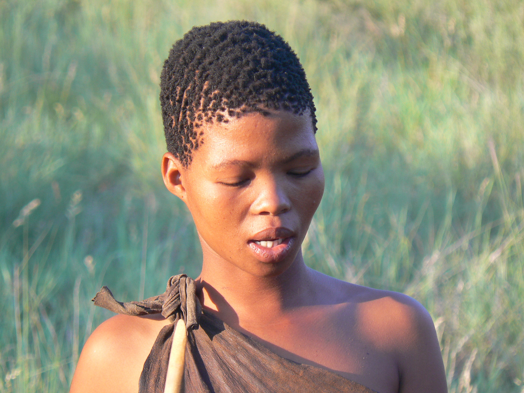 San grandaughter, Botswana